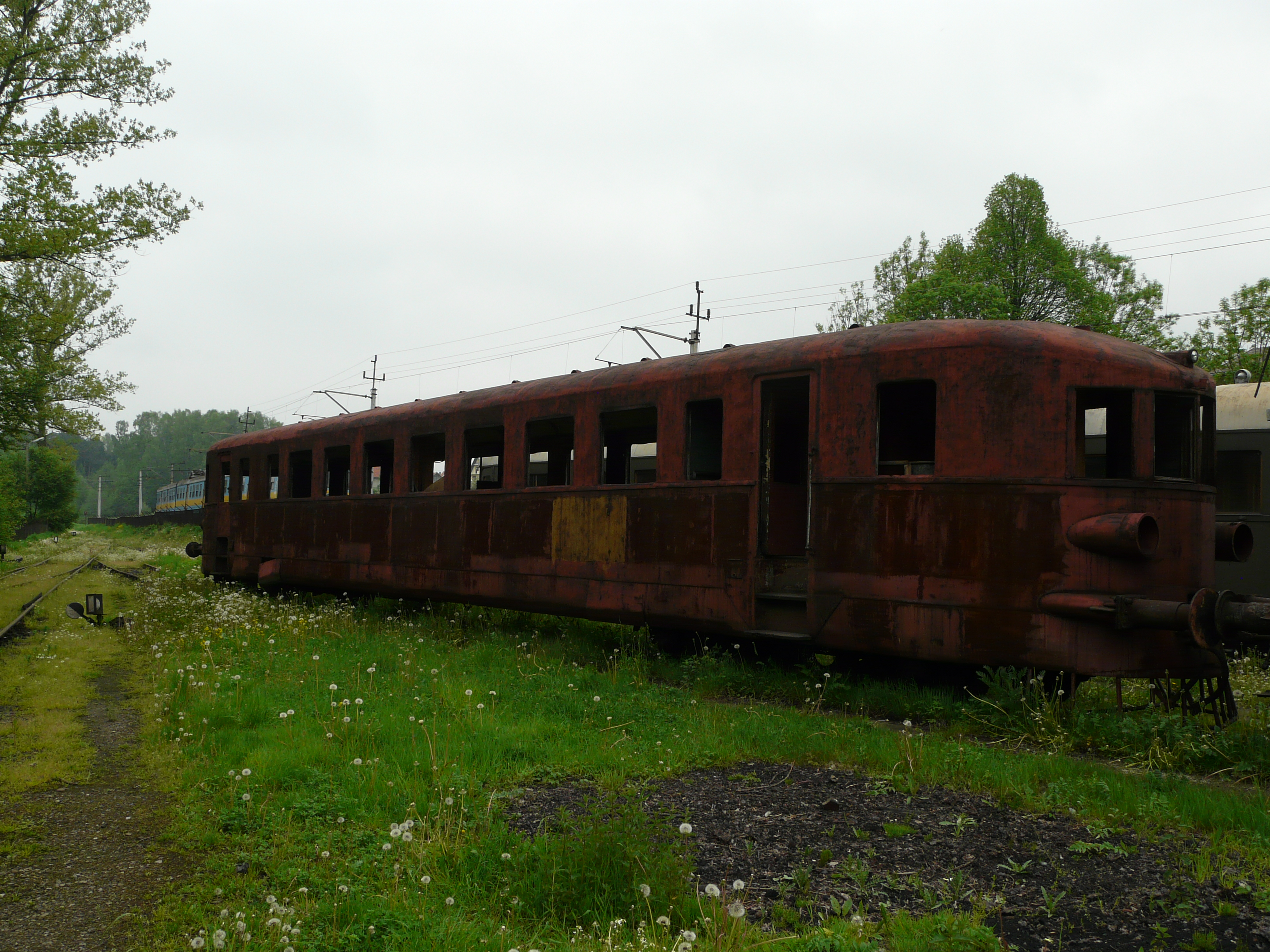 Skansen taboru kolejowego w Chabówce / Chabówka Rolling-Stock Heritage Park